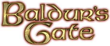 Baldur's Gate (series) logo